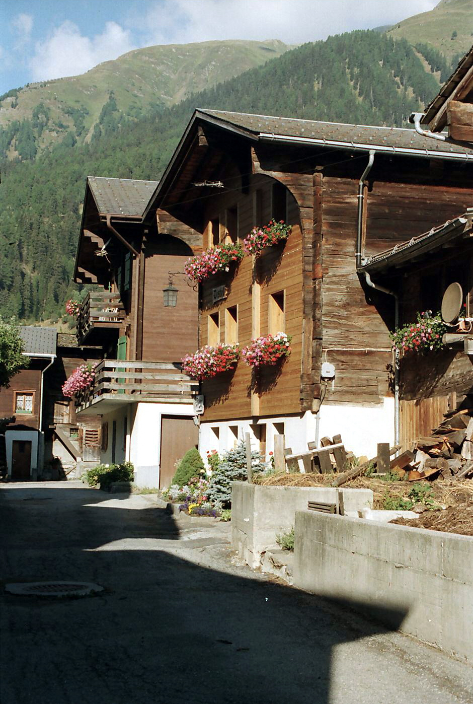 Typische Waliser Holzhäuser in Ritzingen